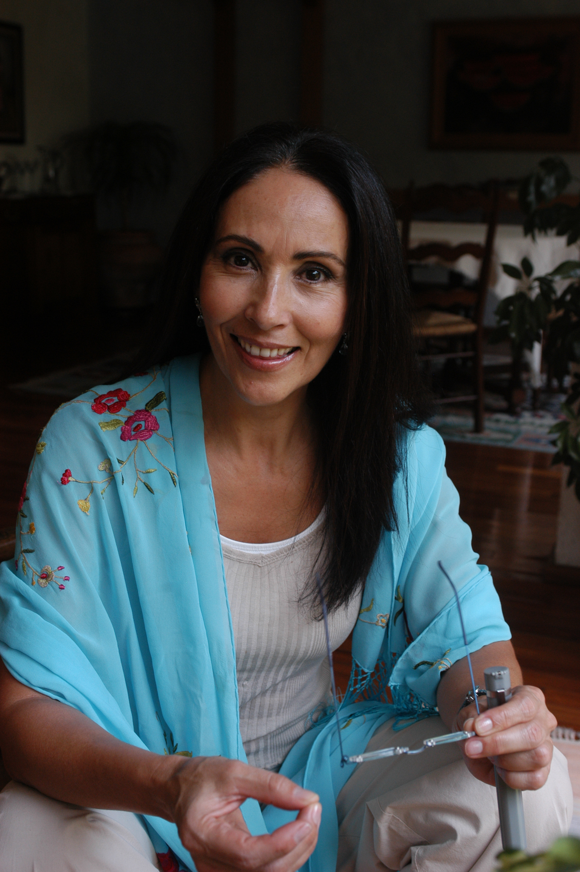 Retrato